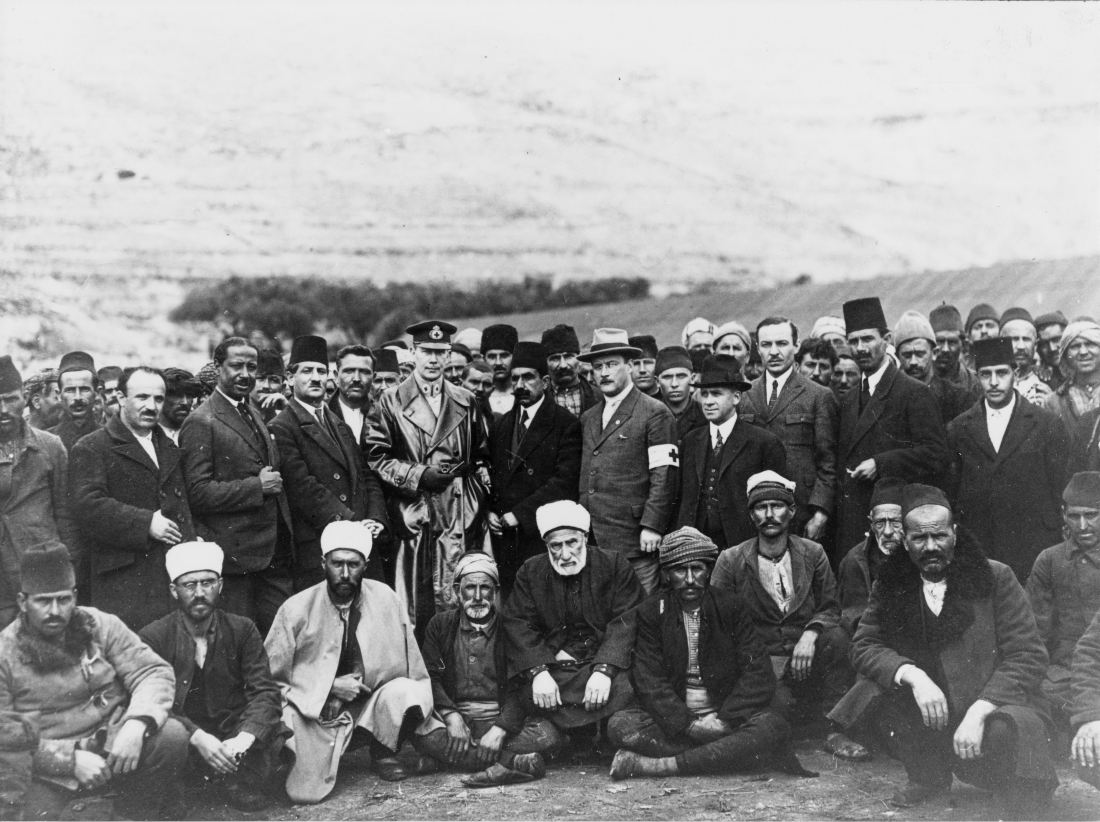 Guerre gréco-turque. Milos. Portrait d'un groupe d'hommes en présence d'un délégué du Comité international de la Croix-Rouge (CICR). Lors de la mission (sept. 1922 - juil. 1923) de Rodolphe de Reding-Biberegg, délégué du CICR en Grèce.